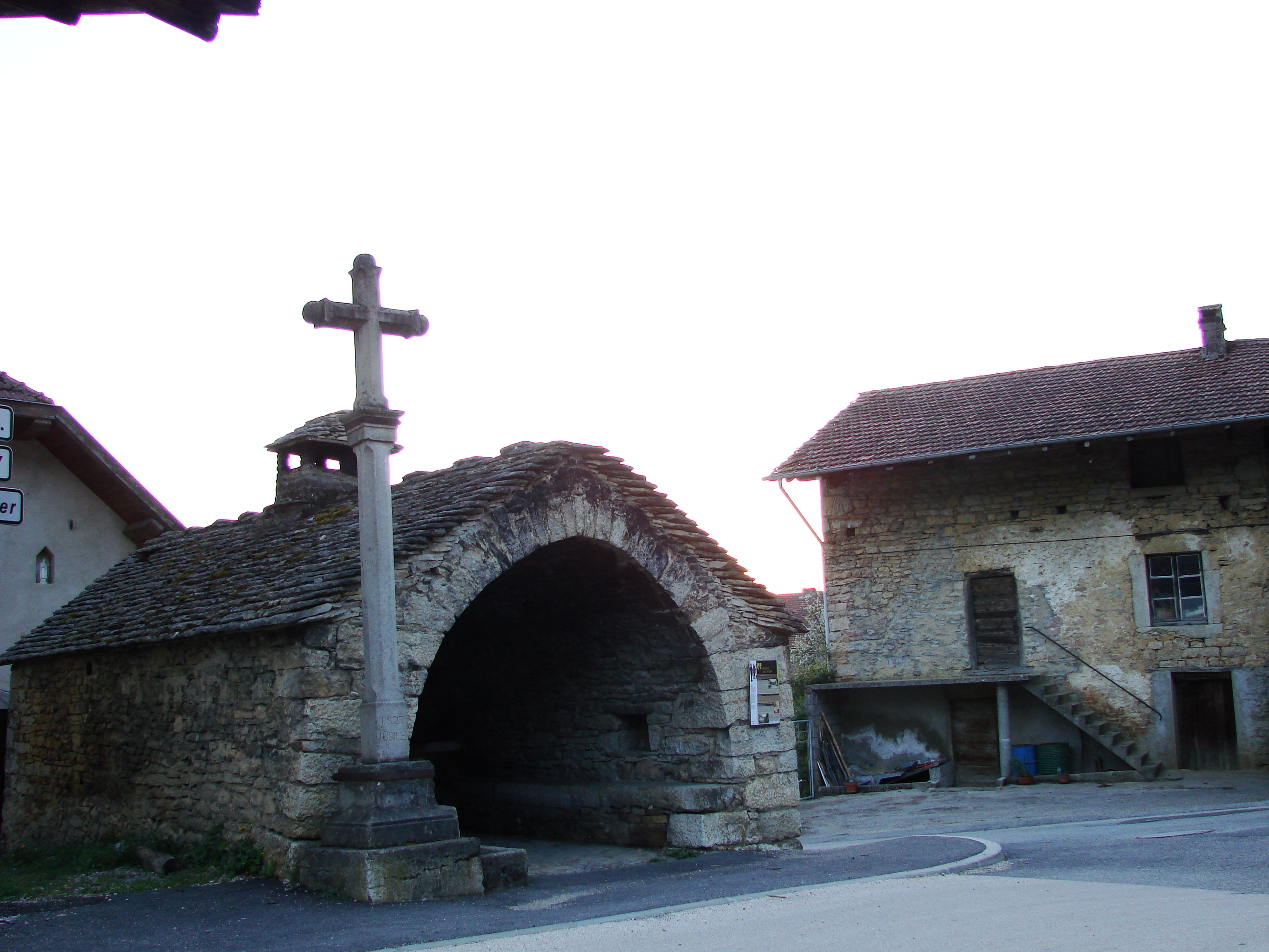 Le four banal de Cleyzieu